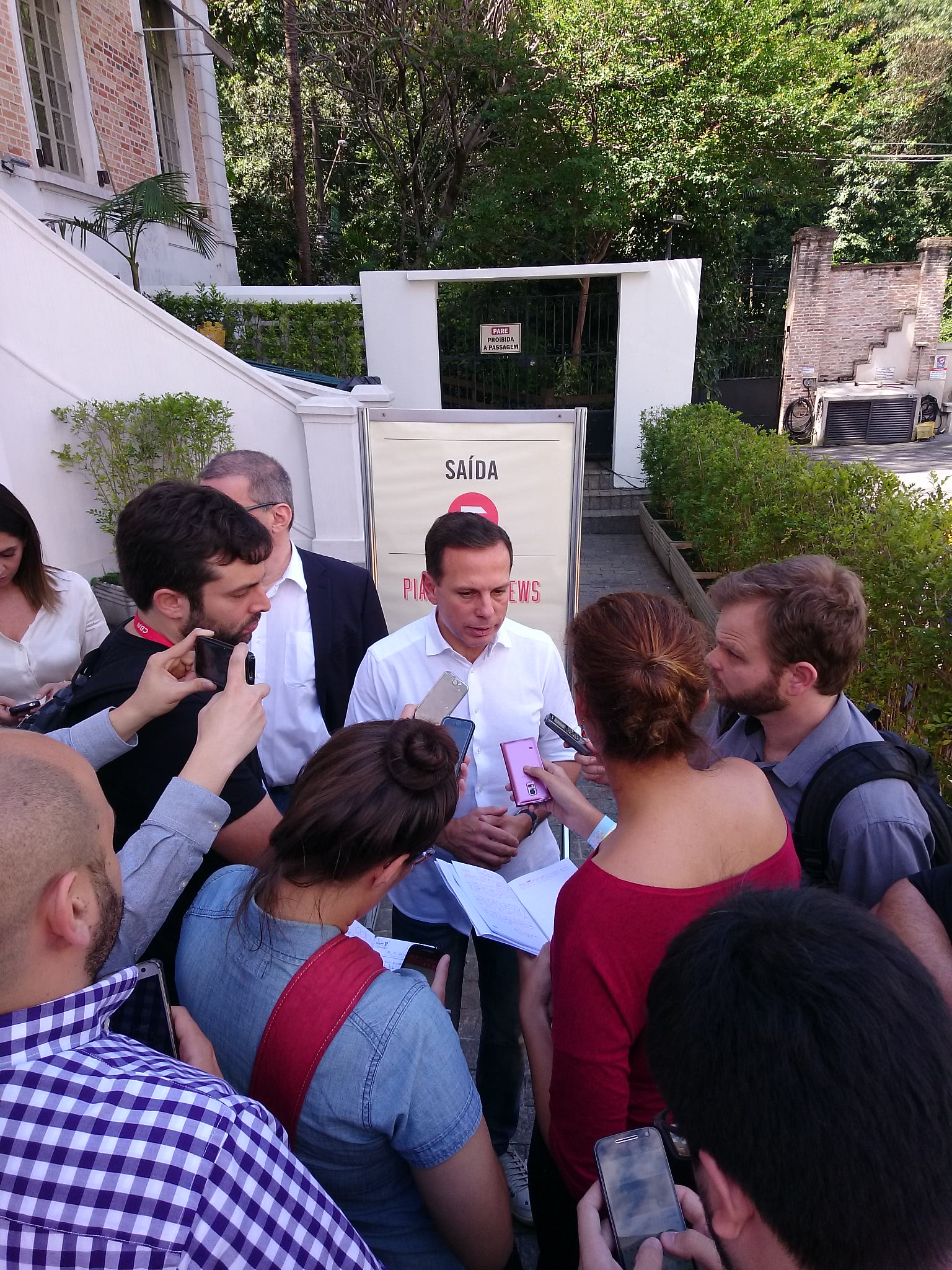 Doria em entrevista no Festival Piauí GloboNews de Jornalismo Colégio Dante - São Paulo